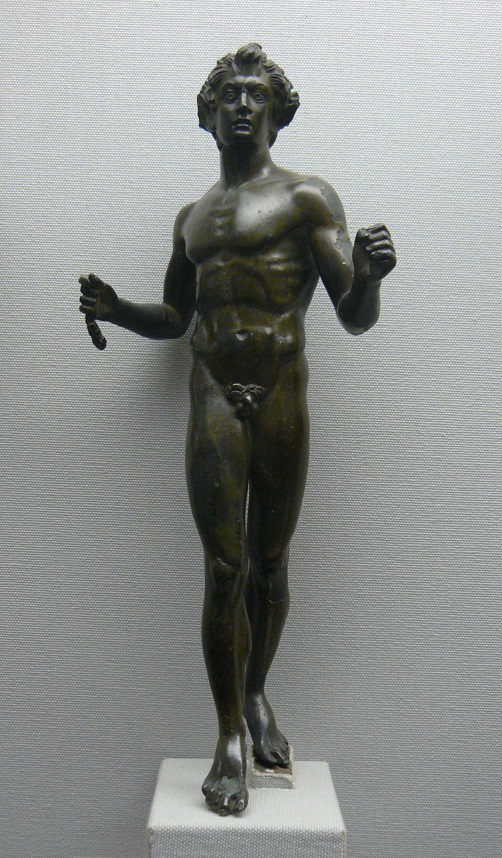 Statuette de Bacchus - Jouey, Côte d'Or, France - II ou III ème siècle ap. J.C. - bronze env. 20 cm